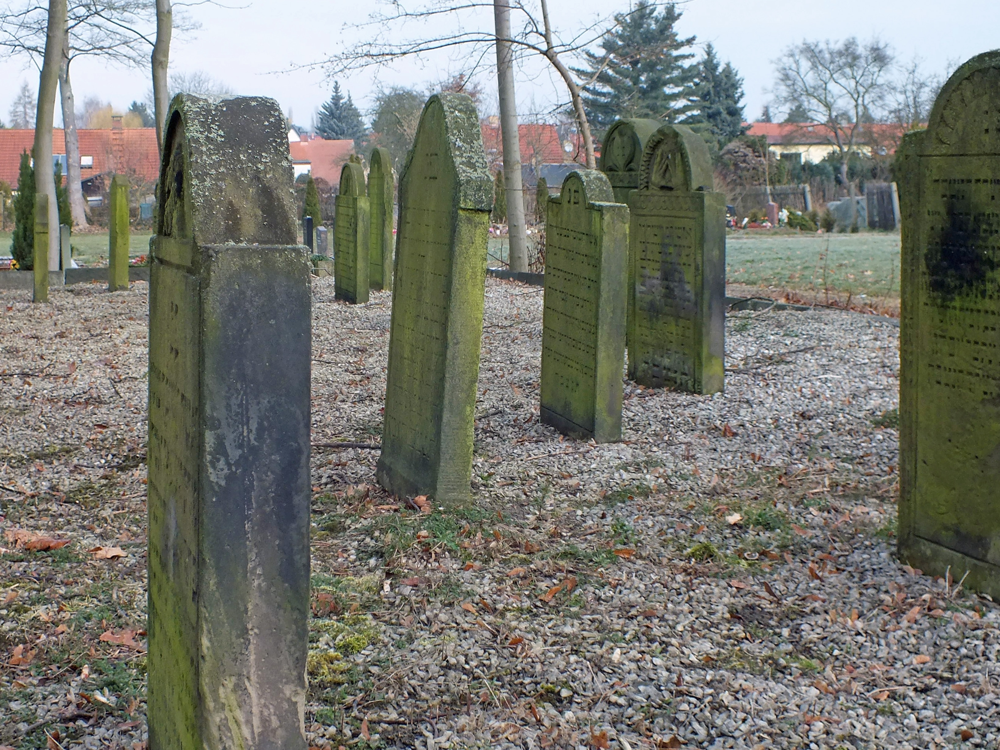 Neuer Israelitischer Friedhof in Leipzig. Grabsteine vom ersten Leipziger jüdischen Friedhof im Johannistal